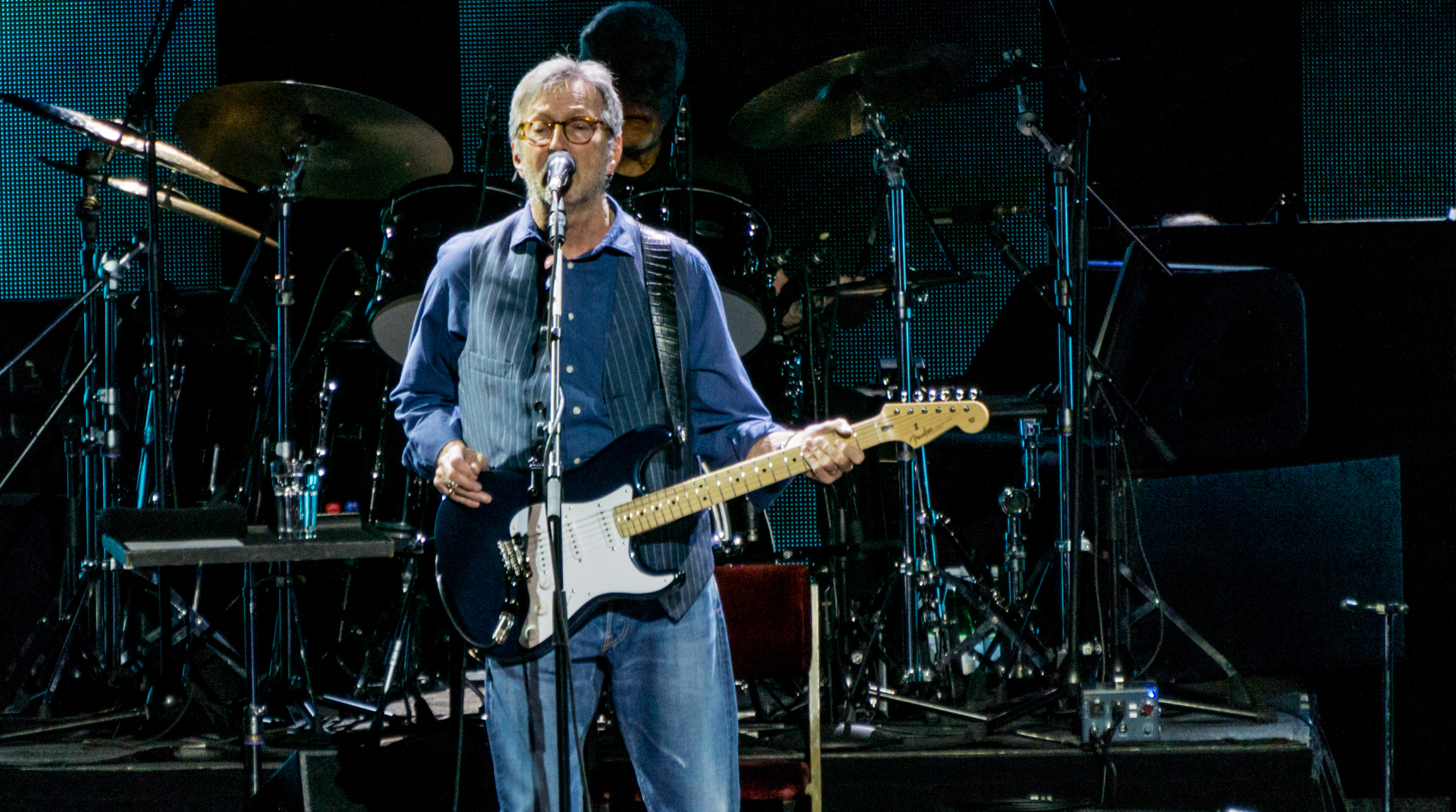 EricClaptonRAH240517-3